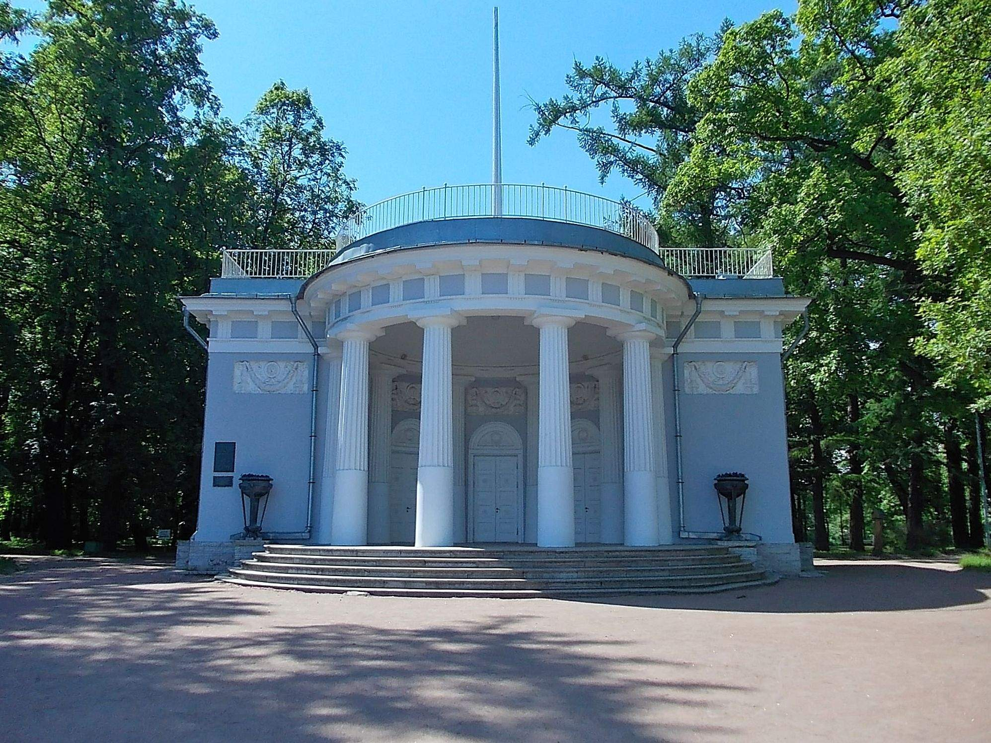 Павилион Под Флагом